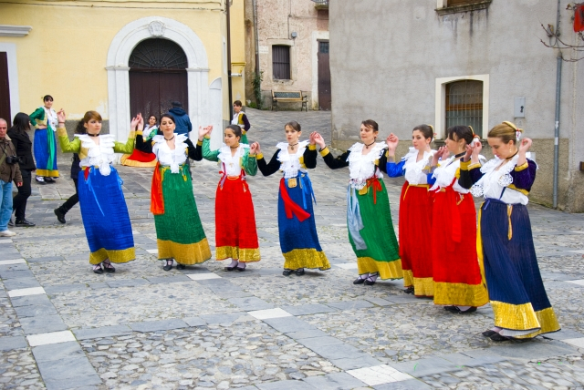 Le vallje sono danze e canti con cui gli albanesi di Calabria rievocano le gesta dell'eroe albanese Giorgio Castriota Scanderbeg. I canti sono di solito cori accompagnati da più strumenti musicali. Il ballo, la vallja, è costituita da una "catena" di Arbëreshë che si tengono per mano o legati da un fazzoletto colorato, cantano e ballano. La vallja si sposta sempre, come un drappello di soldati in battaglia. I balli si snodano nelle vie del paese e terminano nella "piazza delle vallje". Wikipedia: Civita; Parco Nazionale del Pollino. Wikipedia: Giorgio Castriota Scanderbeg; Arbëreshë